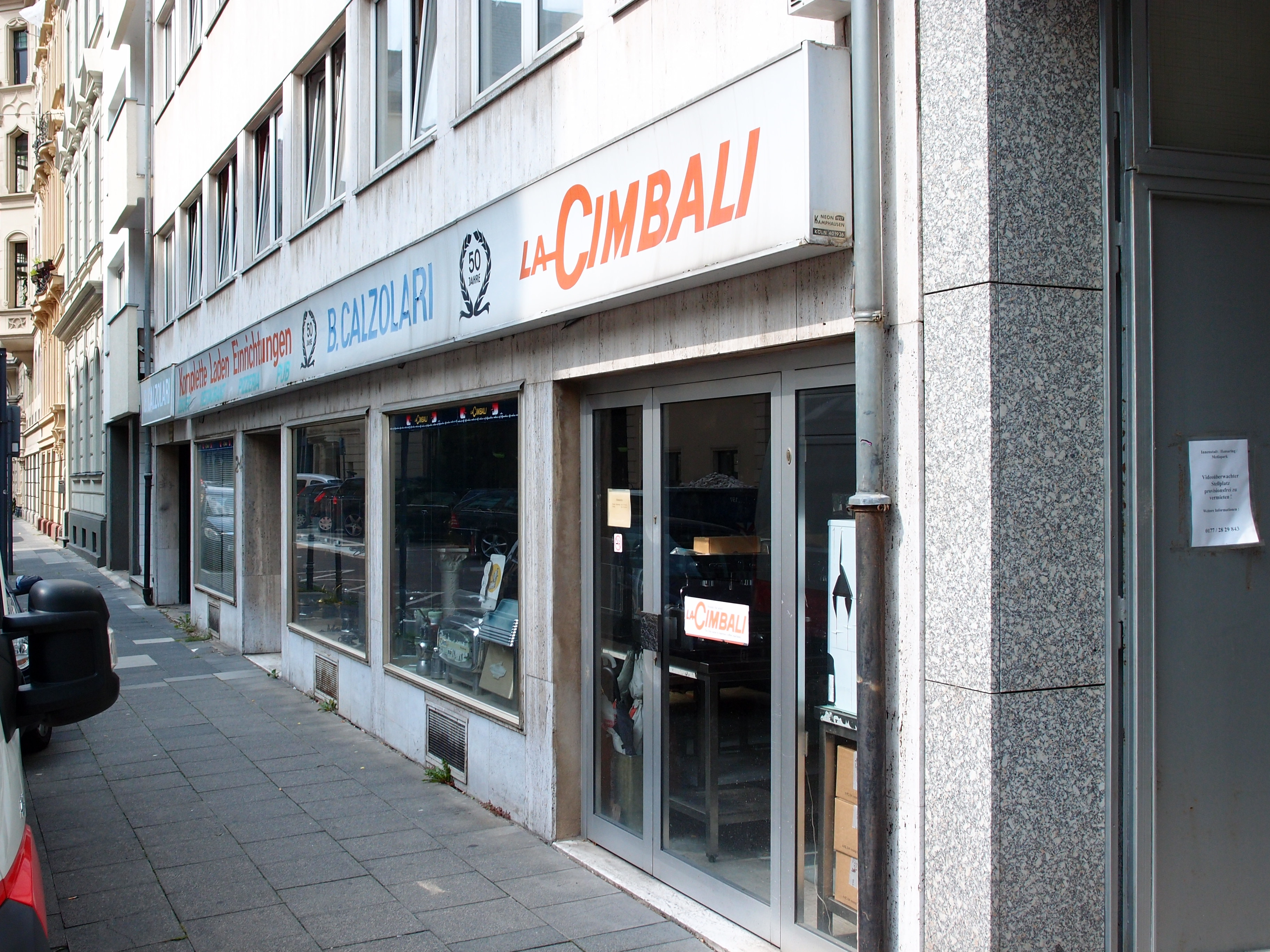 Espressotechnik "La Cimbali" (Filiale Köln) Datum: 26.08.2011 Urheber: M. Pfeiffer alias Benutzer:Gordito1869 Quelle: privates Fotoarchiv des Urhebers